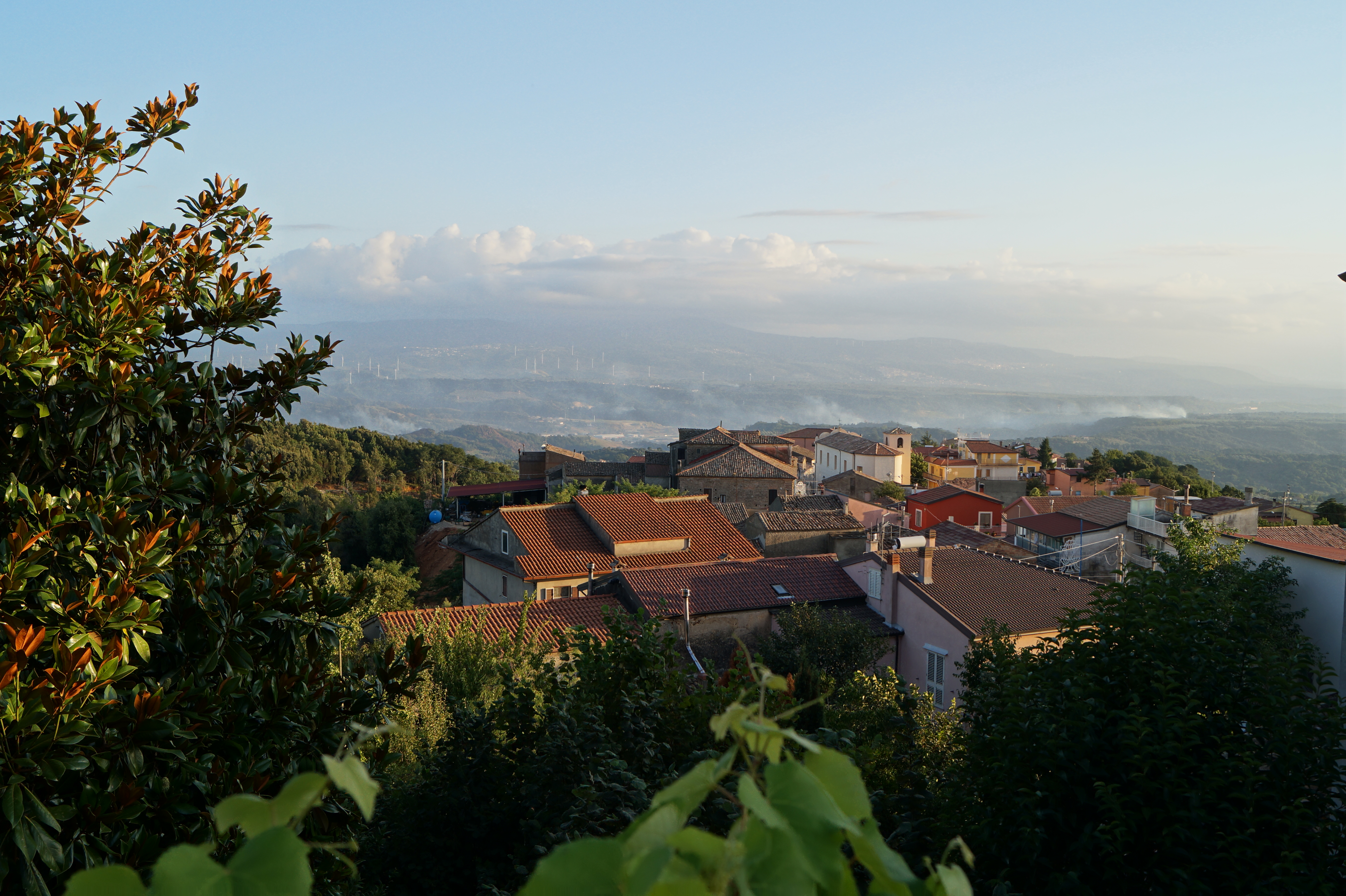 Migliuso